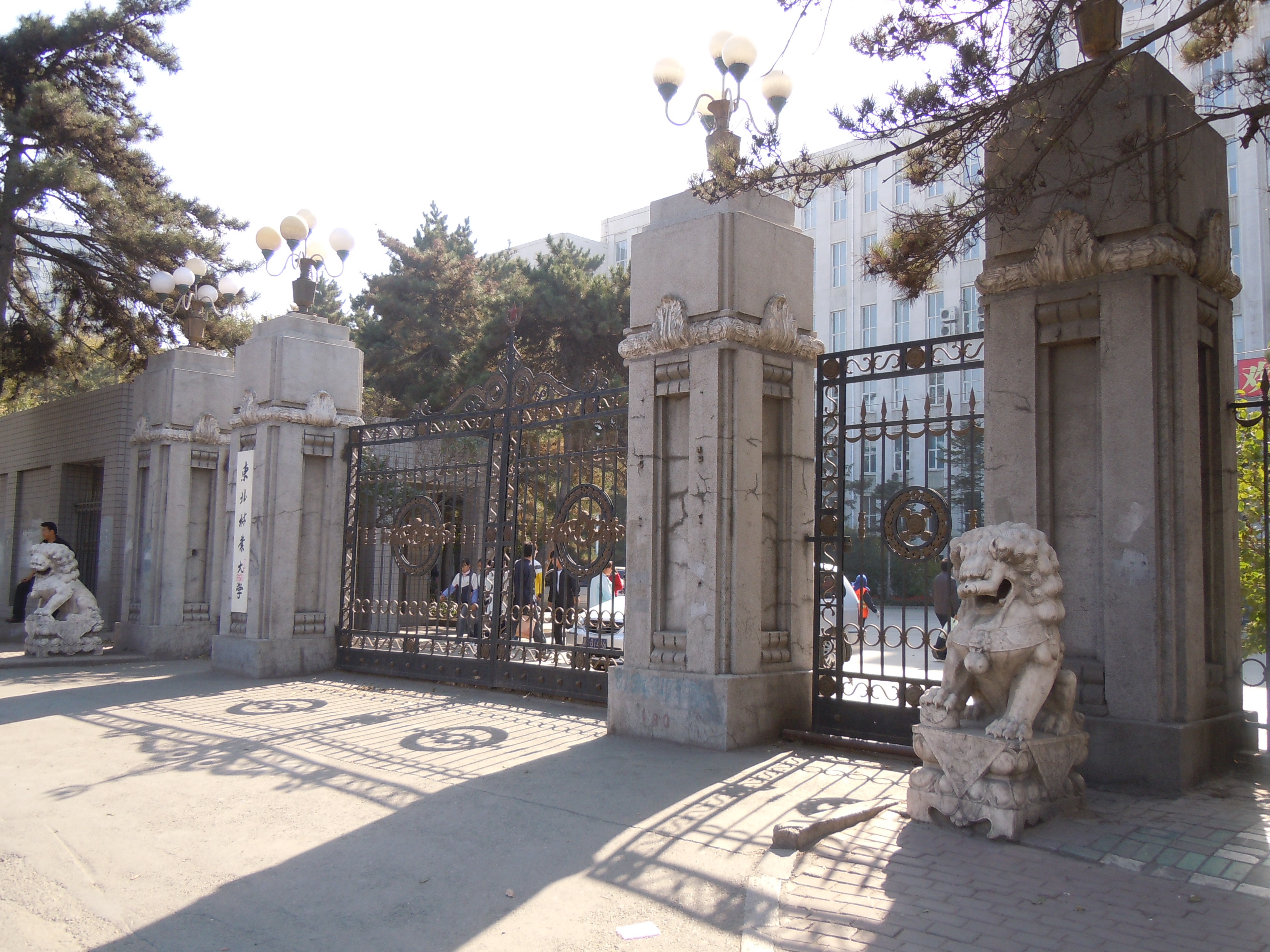 位于哈尔滨市的东北林业大学正门